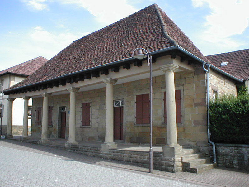 Wachthaus in Sinsheim-Hilsbach, erbaut Anfang des 19. Jahrhunderts als Amtsgebäude am Oberen Tor des Ortes.